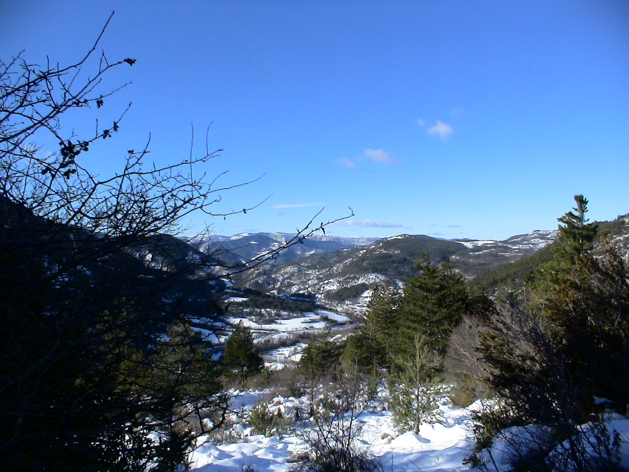 vue du village de Beaurières l'hiver